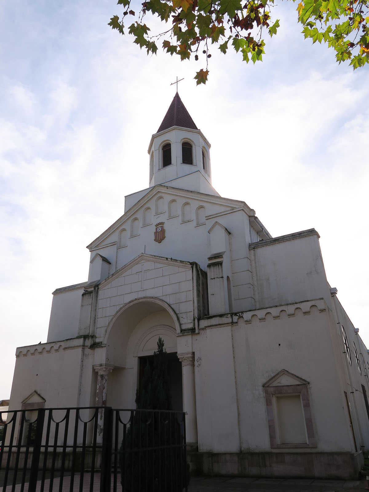 Parroquia La Merced, San javier, Maule, Chile